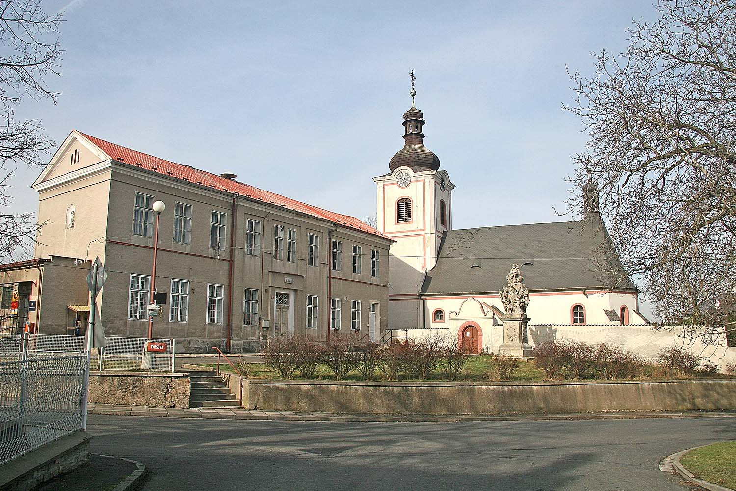 Ratboř_-_kostel_Svatého_Václava, district Kolín autor: Prazak date: 5. 2. 2007